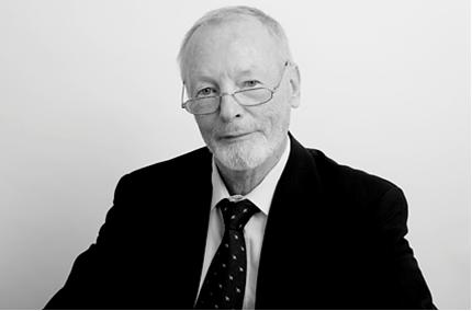 Prof. Dr. Eberhard Ulich